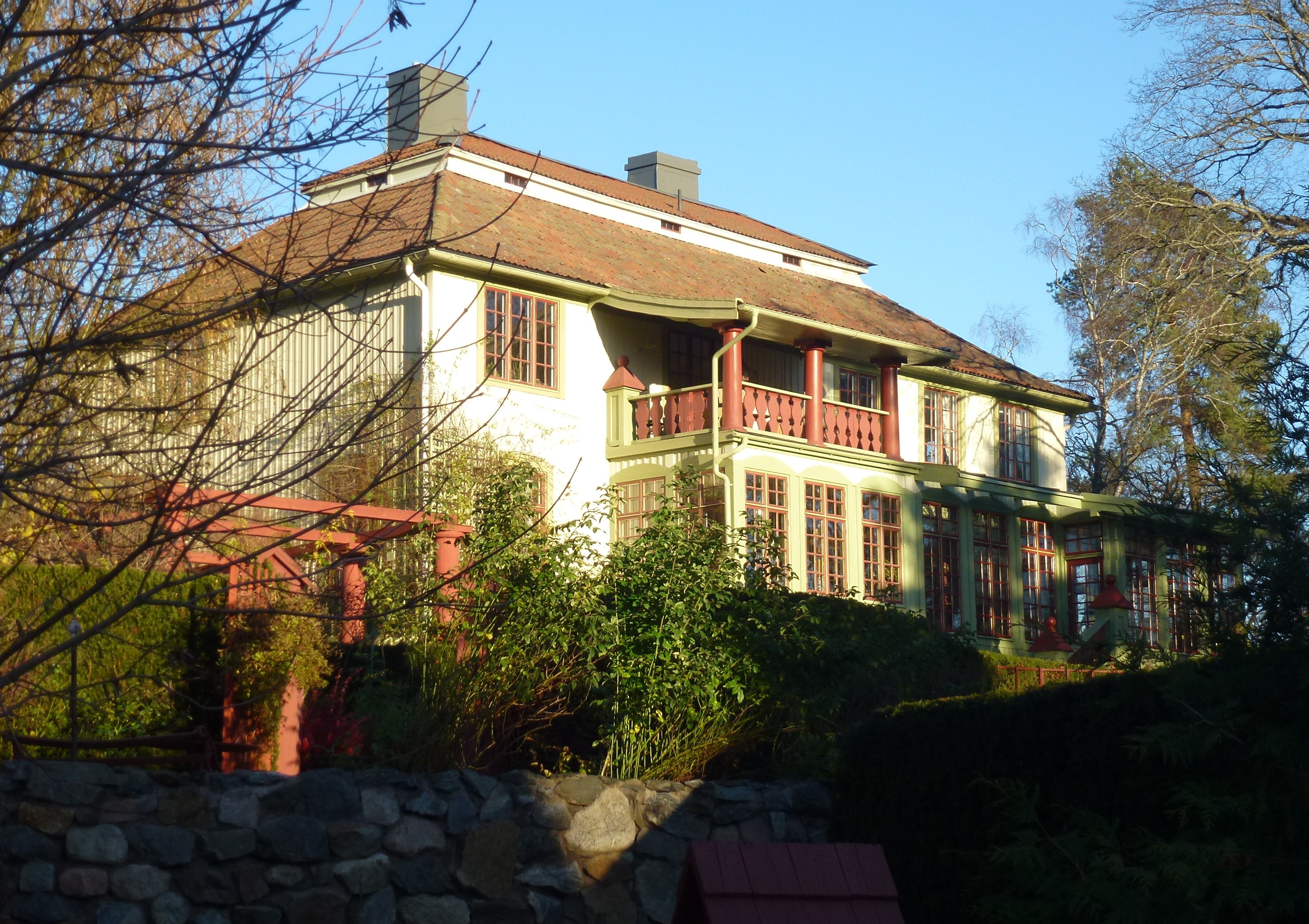 Villa Bellander, Storängen (Storängsv 26 alt John Lodéns v 11) arkitekt Ragnar Östberg. ursprungligen ritad av Sam Kjellberg och brandskadades.